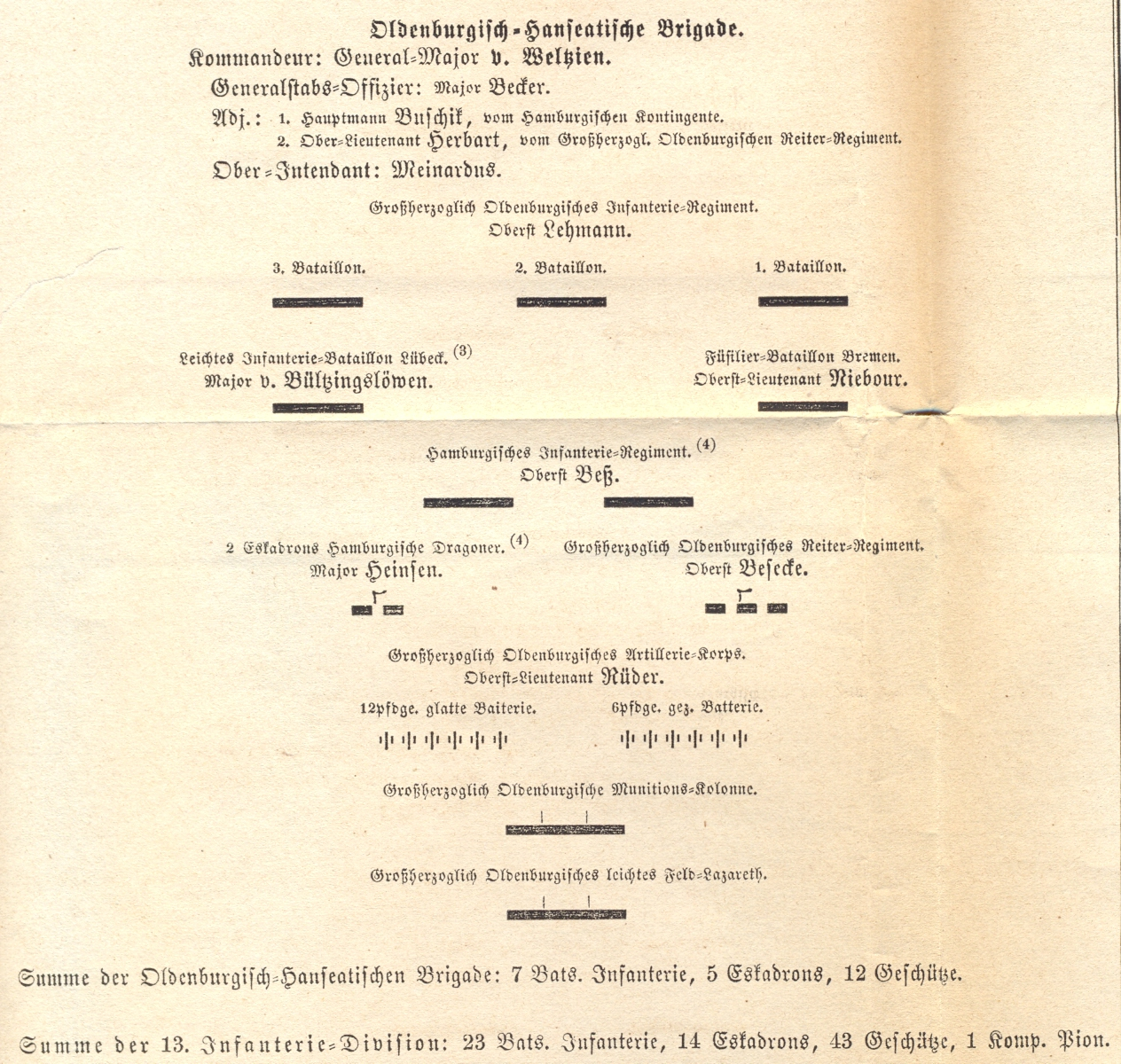 Ordre de bataille der Oldenburgisch-Hanseatische Brigade Weltzin in der 13. Inf.Div. der preußischen Main-Armee im Deutschen Krieg 1866